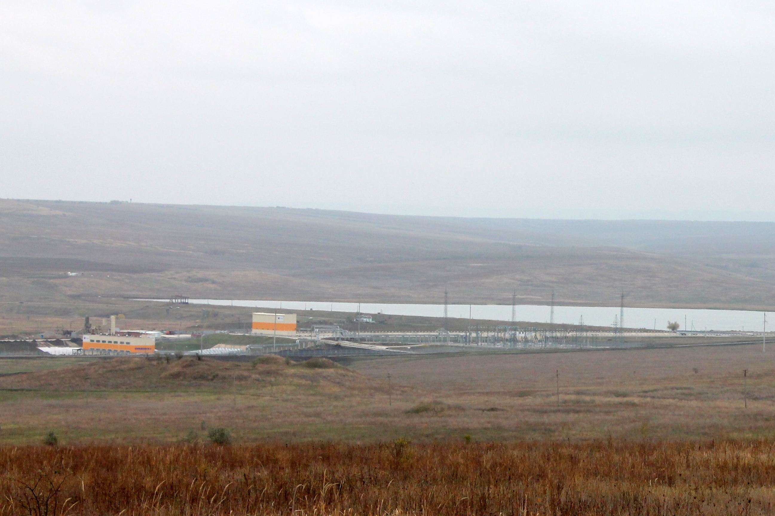 Панорама Егорлыкской ГЭС-2